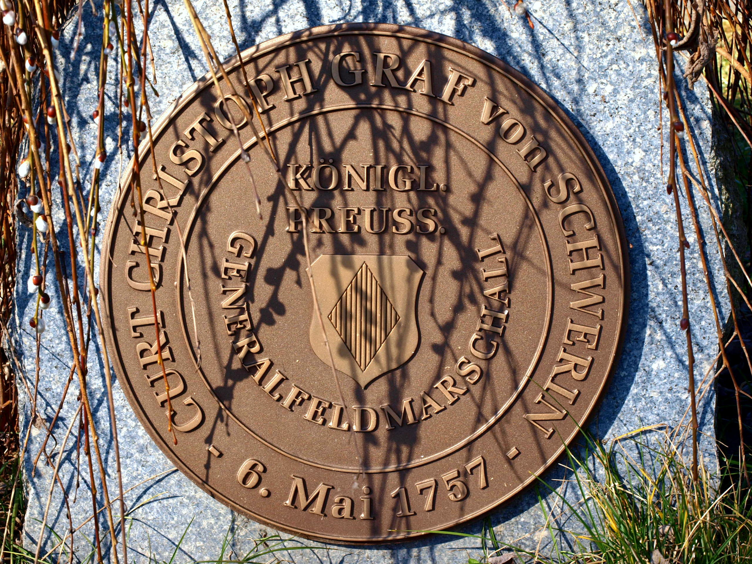 Štěrboholy Pamětní deska